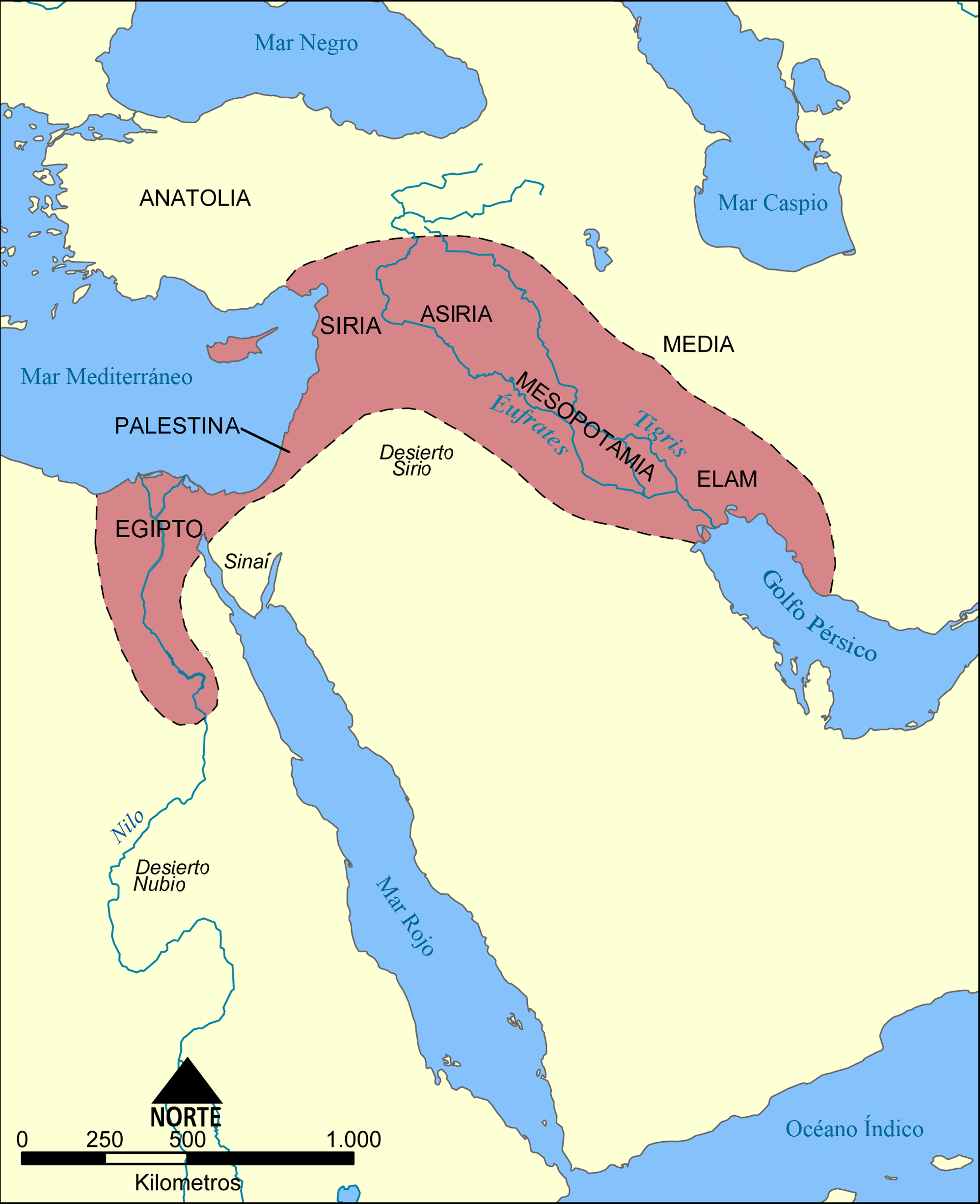 Este mapa muestra la localización y extensión del Creciente Fértil, una región de Oriente Medio que abarcaba el Aniguo Egipto, el Levante mediterráneo, Meospotamia y otras civilizaciones.